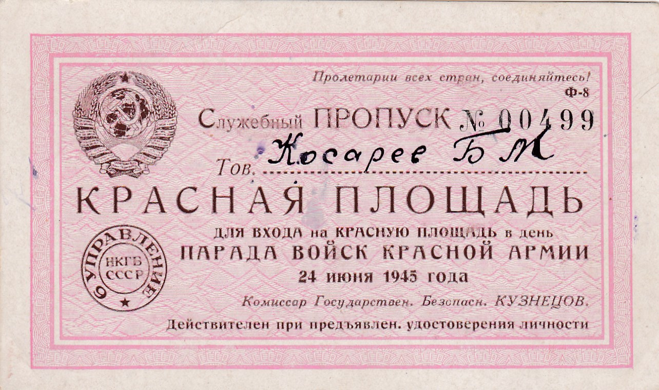 Пропуск Бориса Косарева на Красную Площадь, парад Победы 24 июня 1945 года